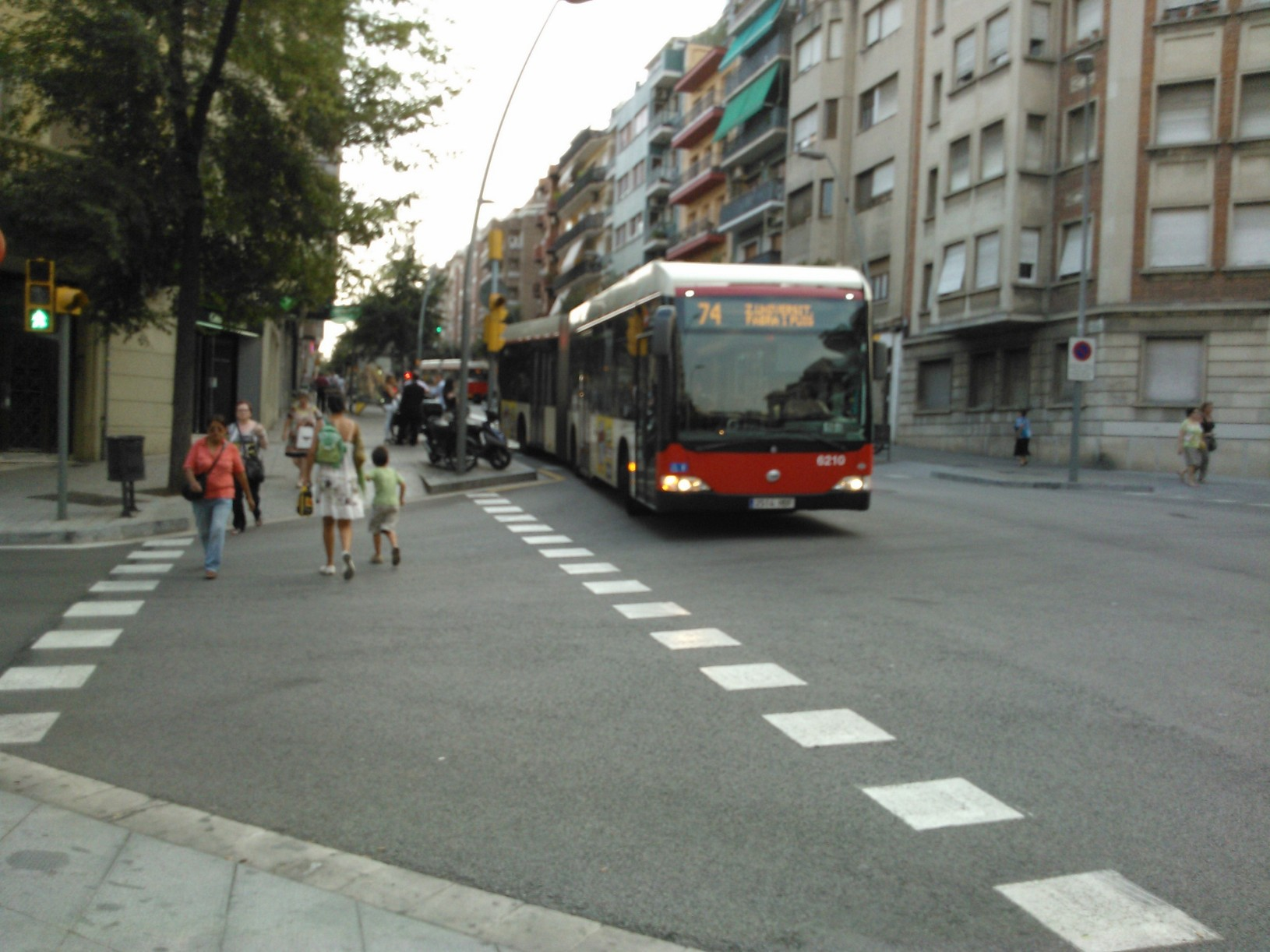 Autobús línia 74, futura línia H5